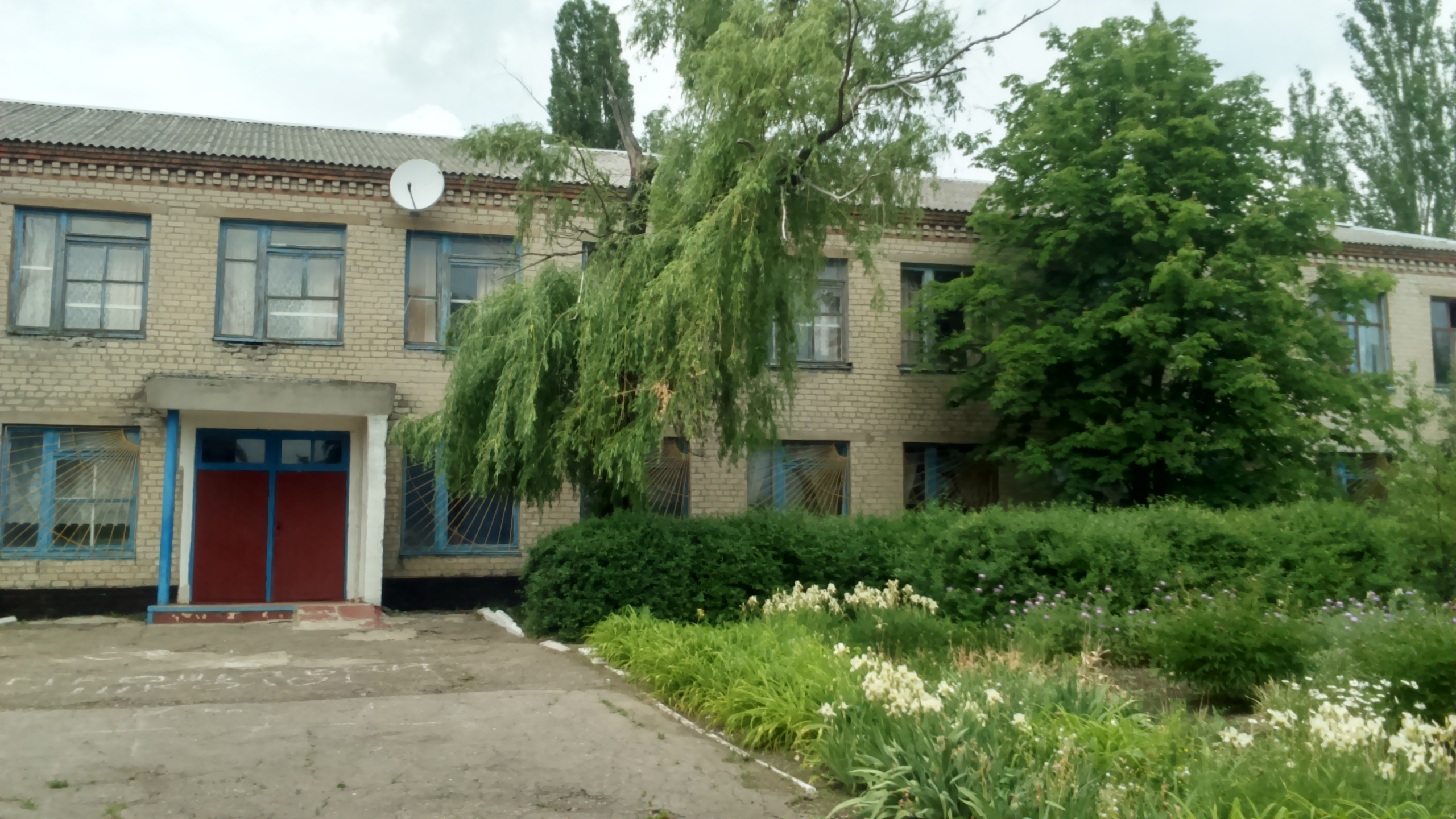 Школа в селі Никанорівка Добропільський район.